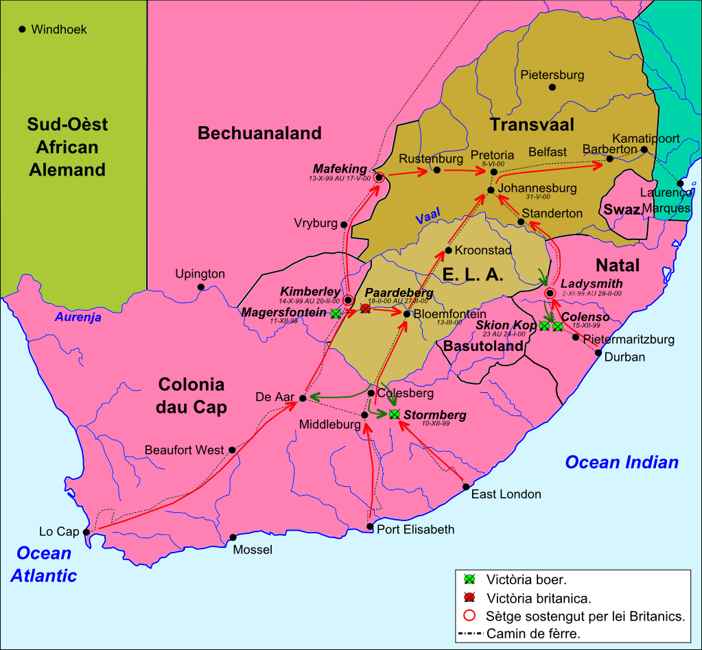 Esquèma generau de la Segonda Guèrra dei Boers.